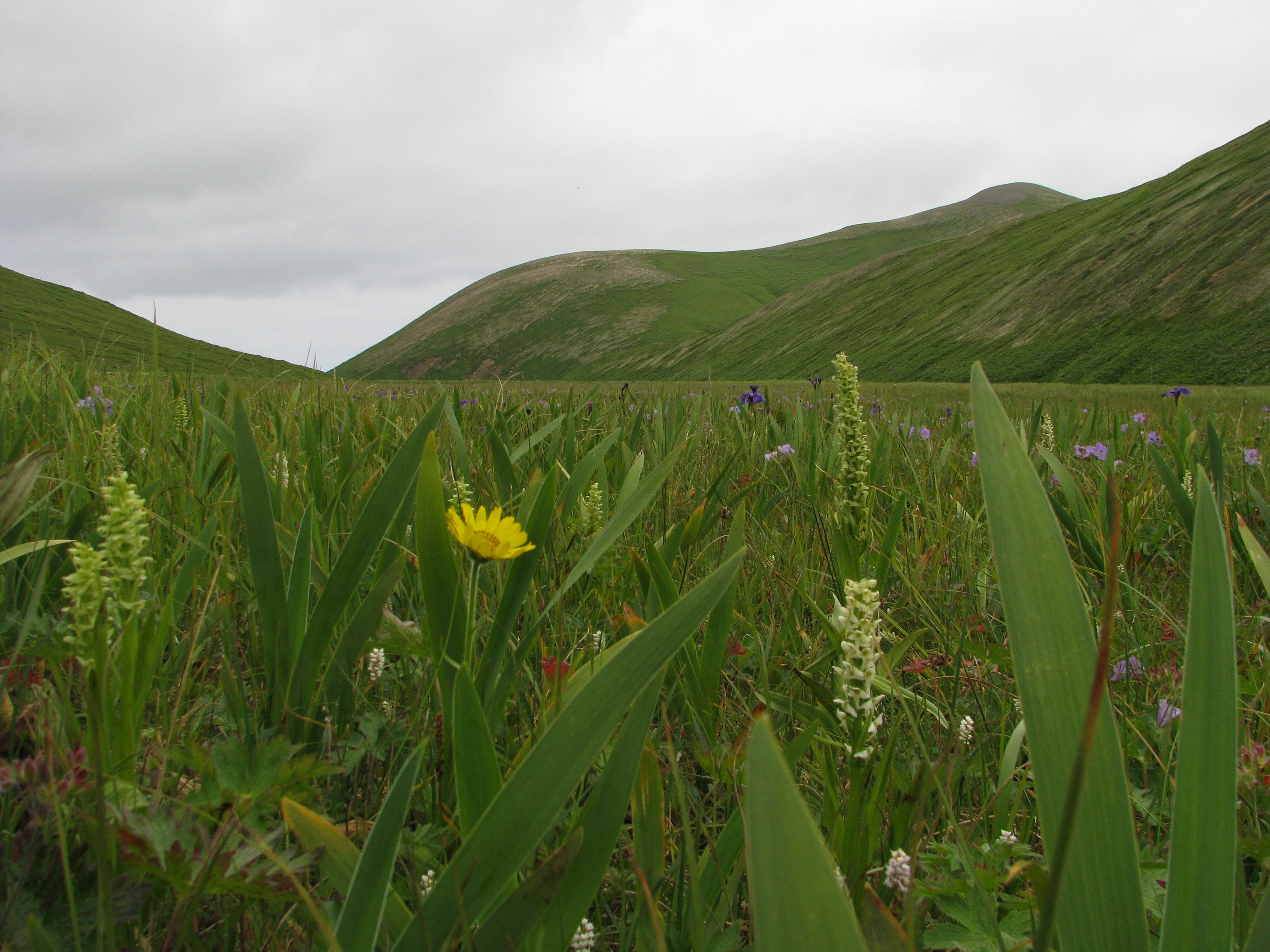 Командорский заповедник, Алеутский район This image is related to the protected area of Russia number 4100007